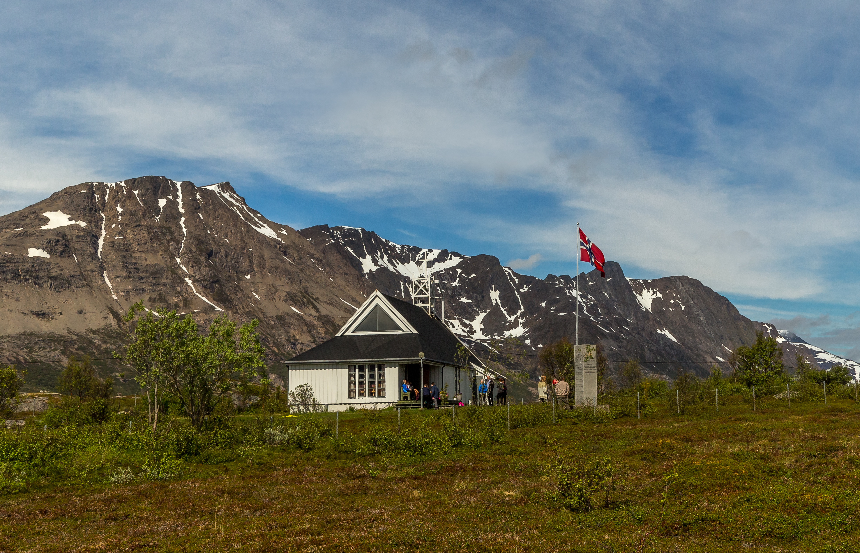 Rognsund kirke